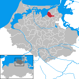 Altenpleen in Mecklenburg-Vorpommern - District Nordvorpommern